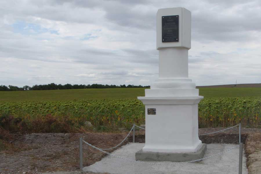 После создания новой мили по образцу оставшихся в Крыму, она была установлена 12.07.2012.